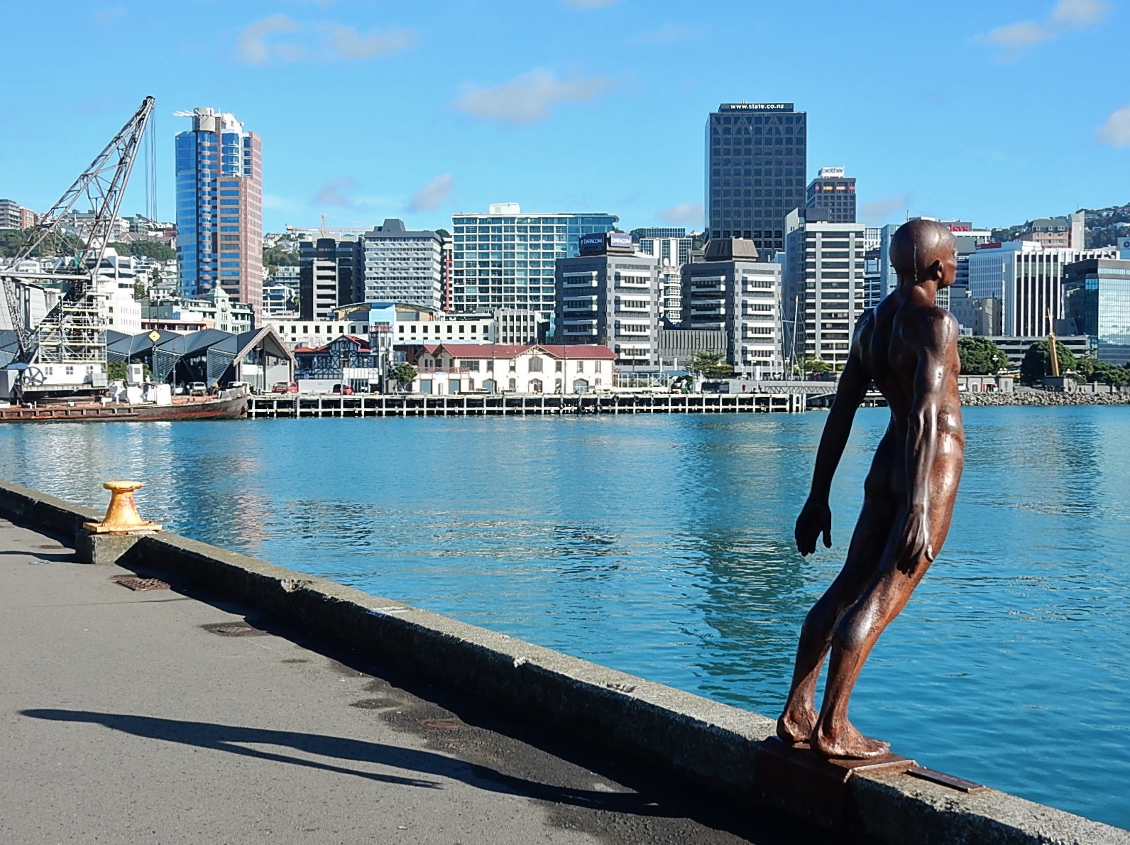 Brave Sculpture